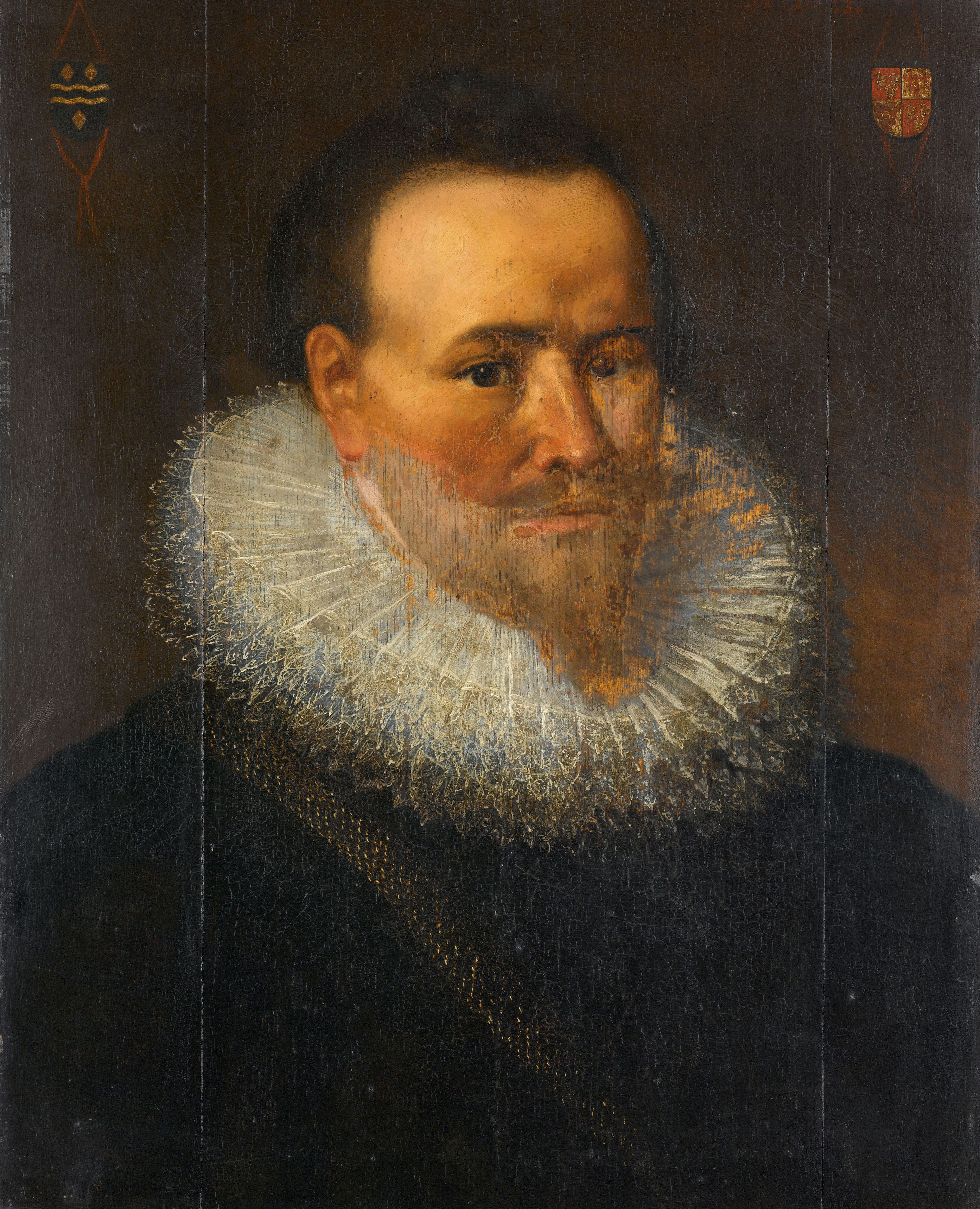 Portret van een man, waarschijnlijk Joris van Cats (ca. 1590-1654). Buste naar rechts, links- en rechtsboven familiewapens.